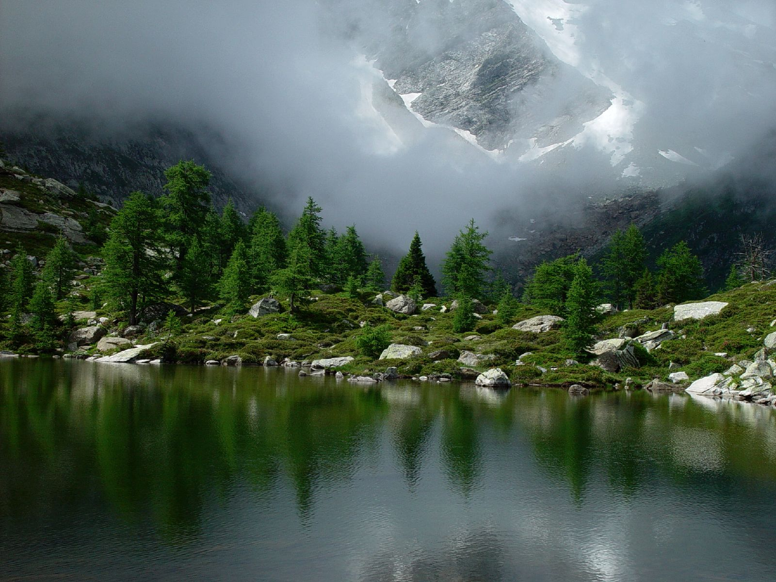 Subalpine lake in Goms, Switzerland